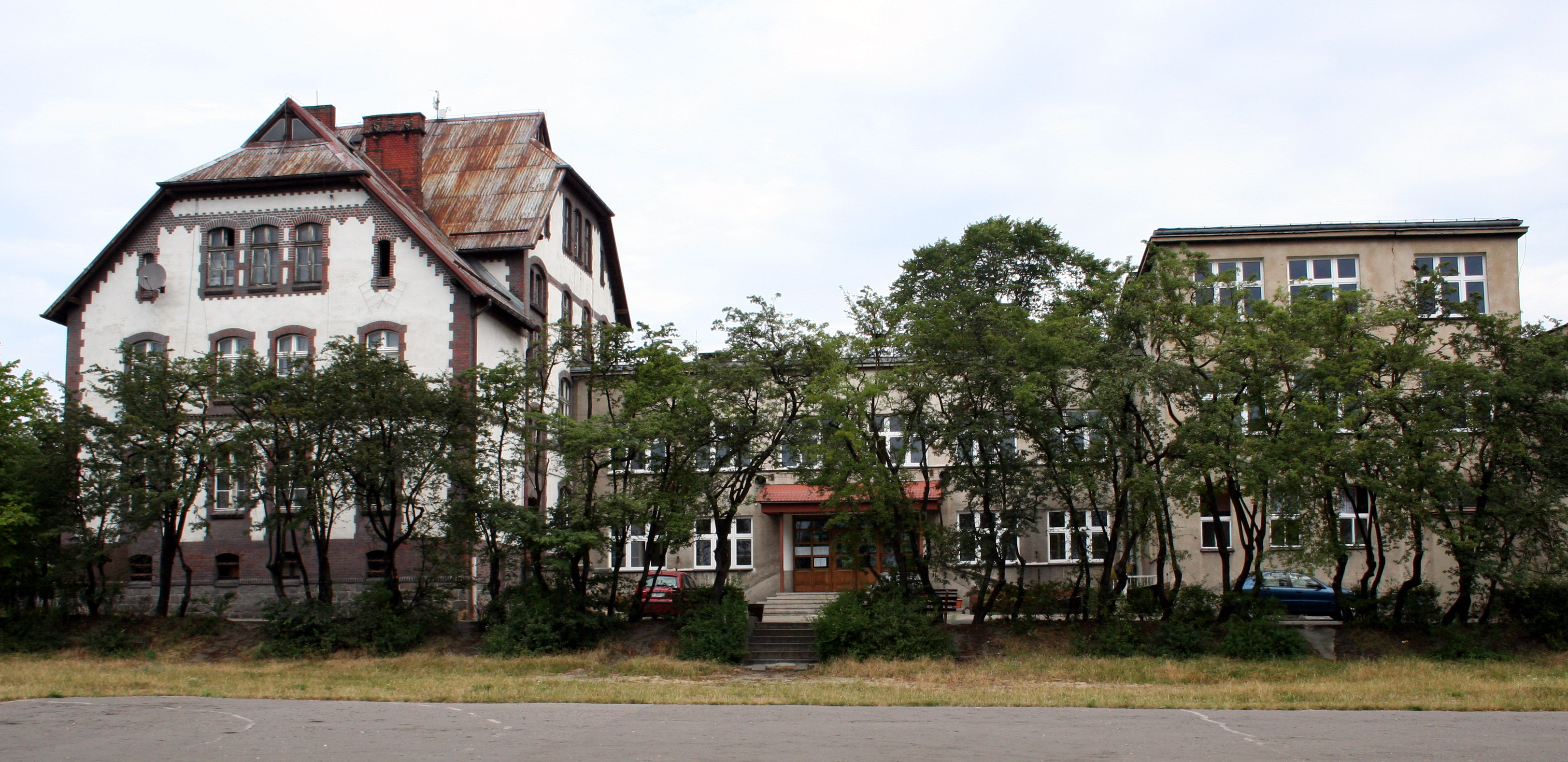 Szkoła podstawowa w Rybniku Niedobczycach